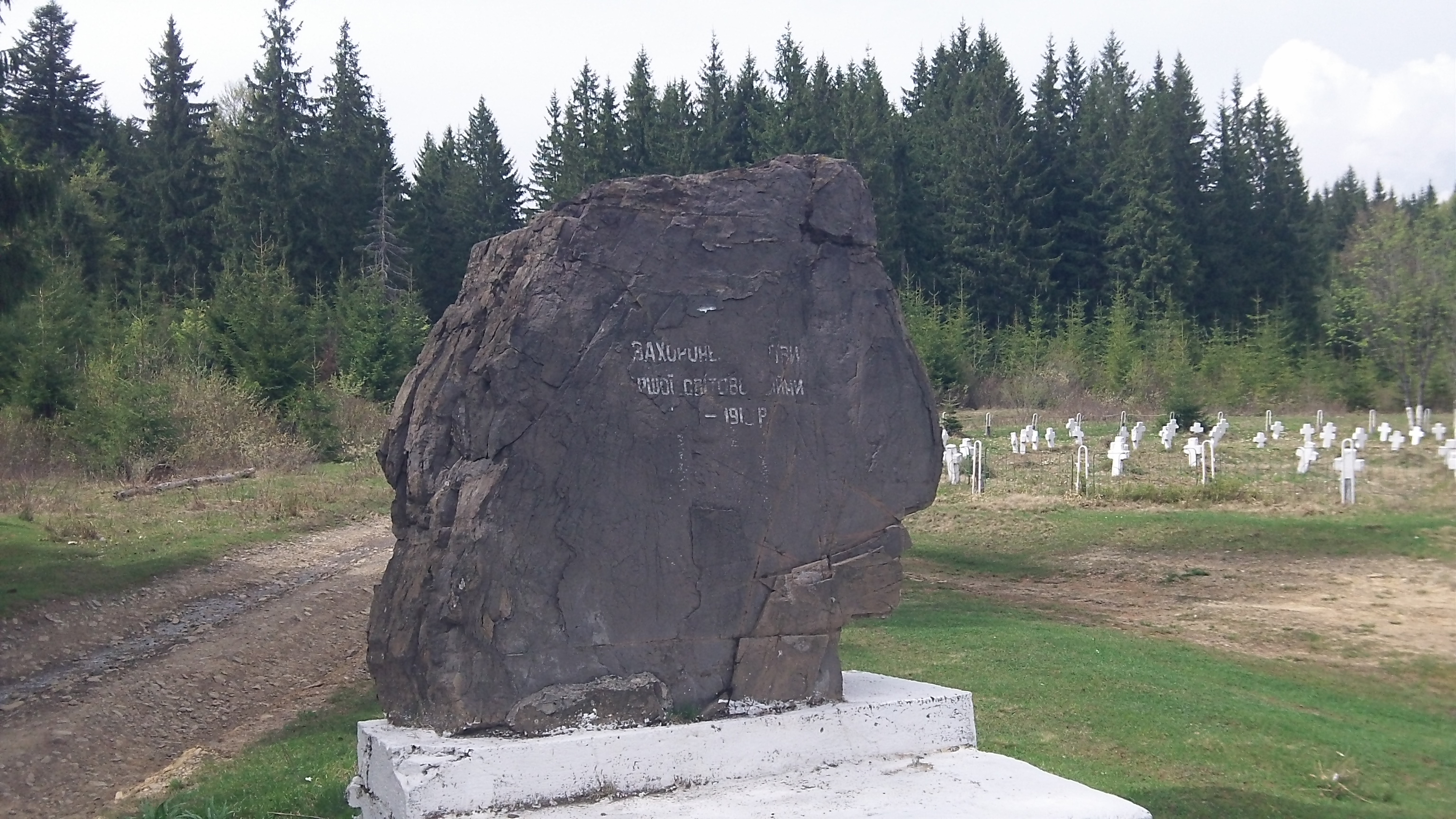 Кладовище вояків, полеглих у І світовій війні, село Вишків